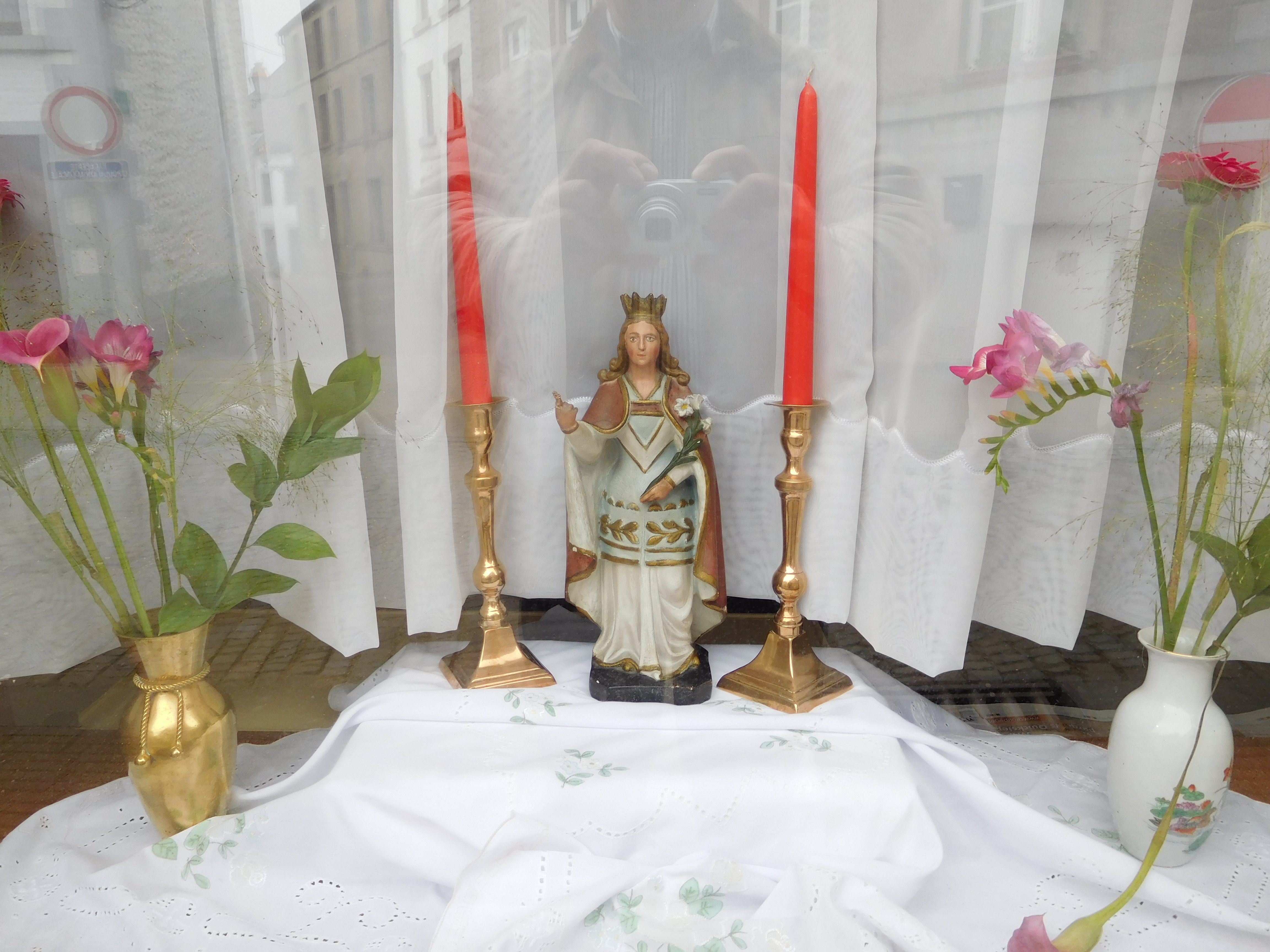 Petit autel domestique (de fenêtre) préparé pour la procession religieuse en l'honneur de Sainte Rolende (à Gerpinnes, Belgique)